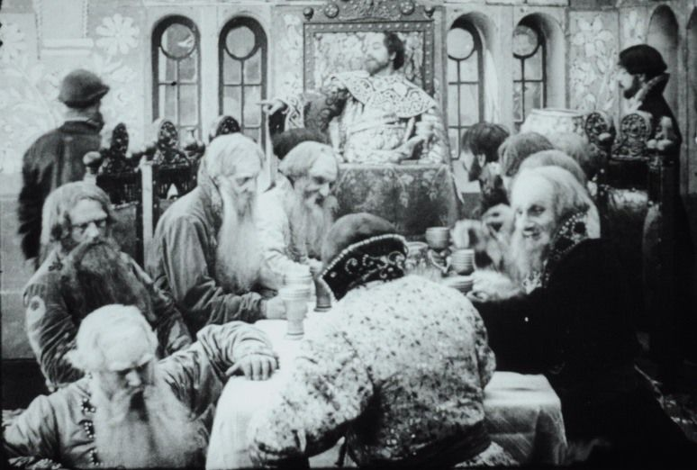 Кадр из фильма "300-летие царствования дома Романовых" (1913)